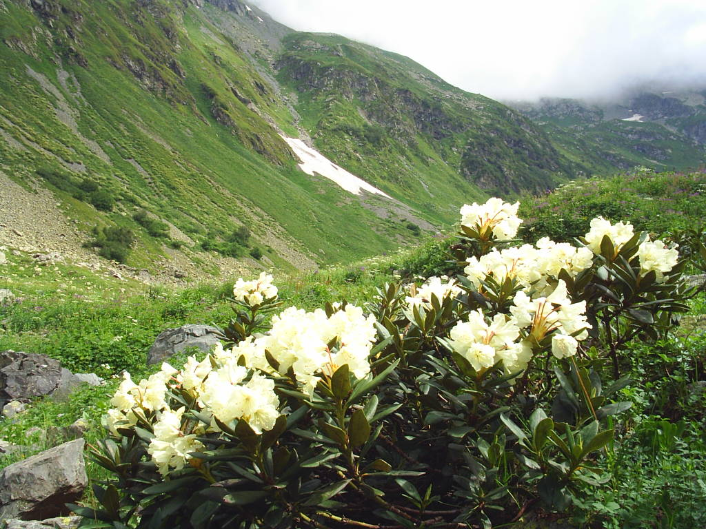 Цветущий рододендрон в долине Верхней Мзымты